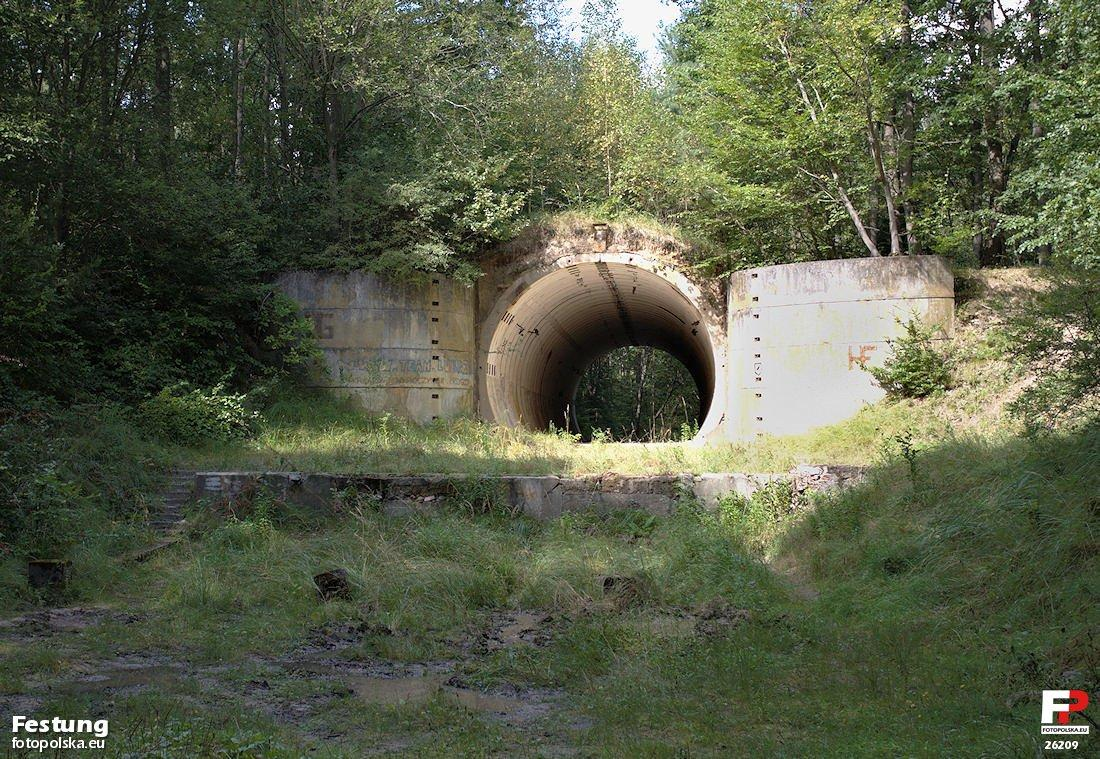 Przeznaczenie tej, zresztą nie jedynej tego typu budowli na terenie obiektu 3003, nie jest zbyt jasne. Podobne widywałem przy radzieckich lotniskach. Podziemnej części nie ma, jedynie boczne przybudówki. Wiele jest różnych instalacji na zewnętrznej, naziemnej części tunelu. Całość dość solidnie zbudowana, choć daleka jakością od znanych mi niemieckich budowli fortyfikacyjnych, których zresztą pełno na tym terenie.